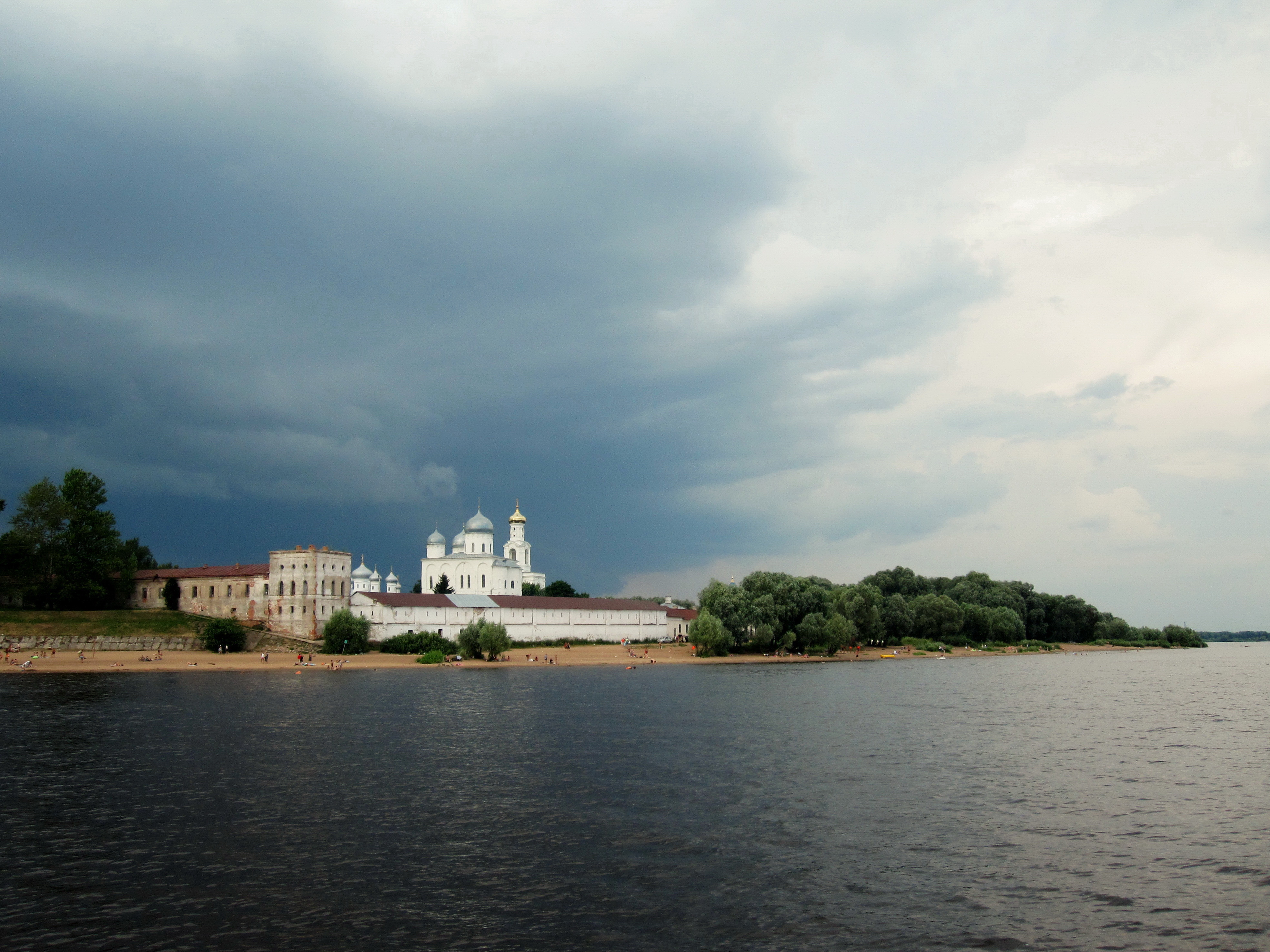 Монастырь Юрьев (Новгородская область, Великий Новгород, д. Юрьево)